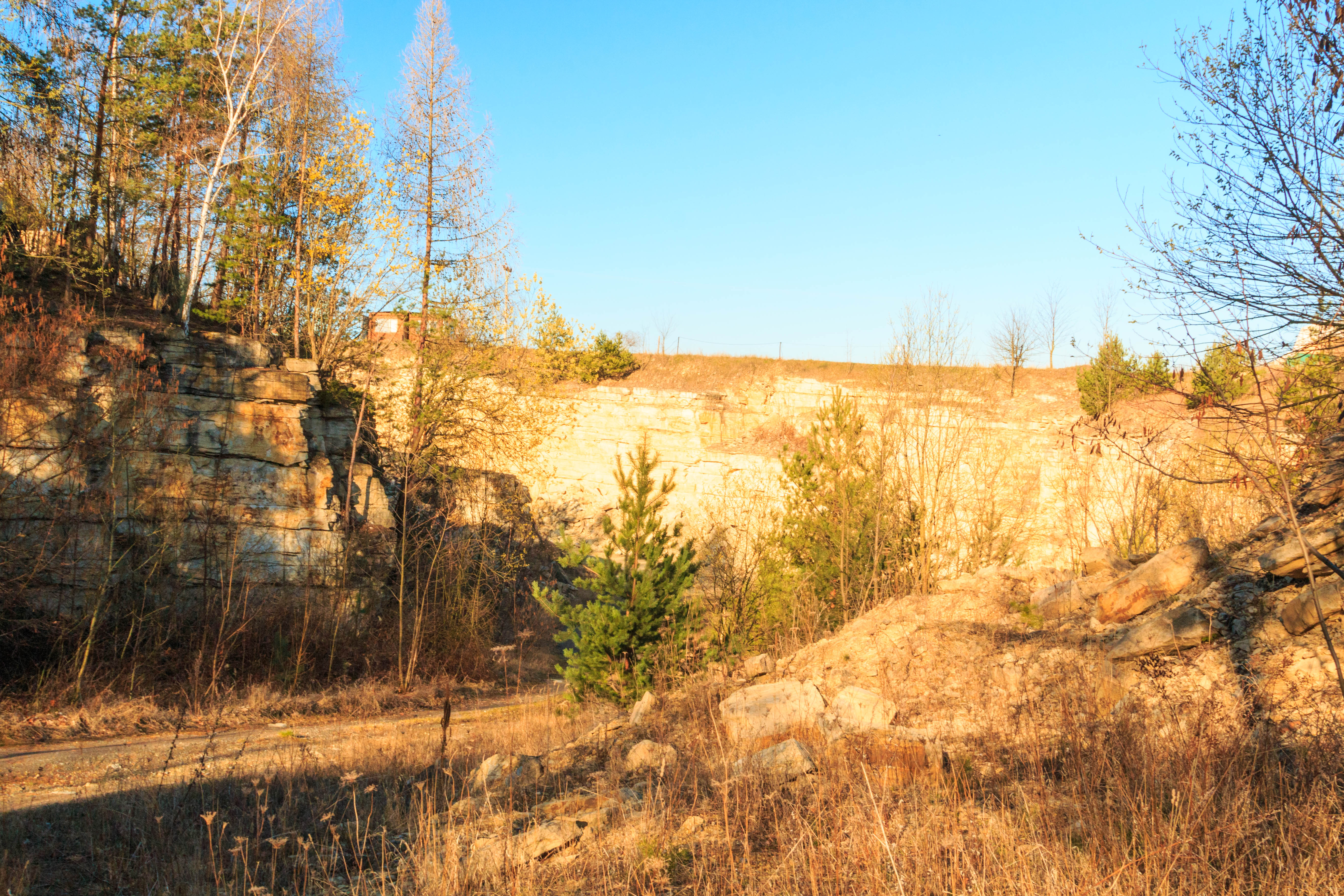 Přibylov - opukový lom